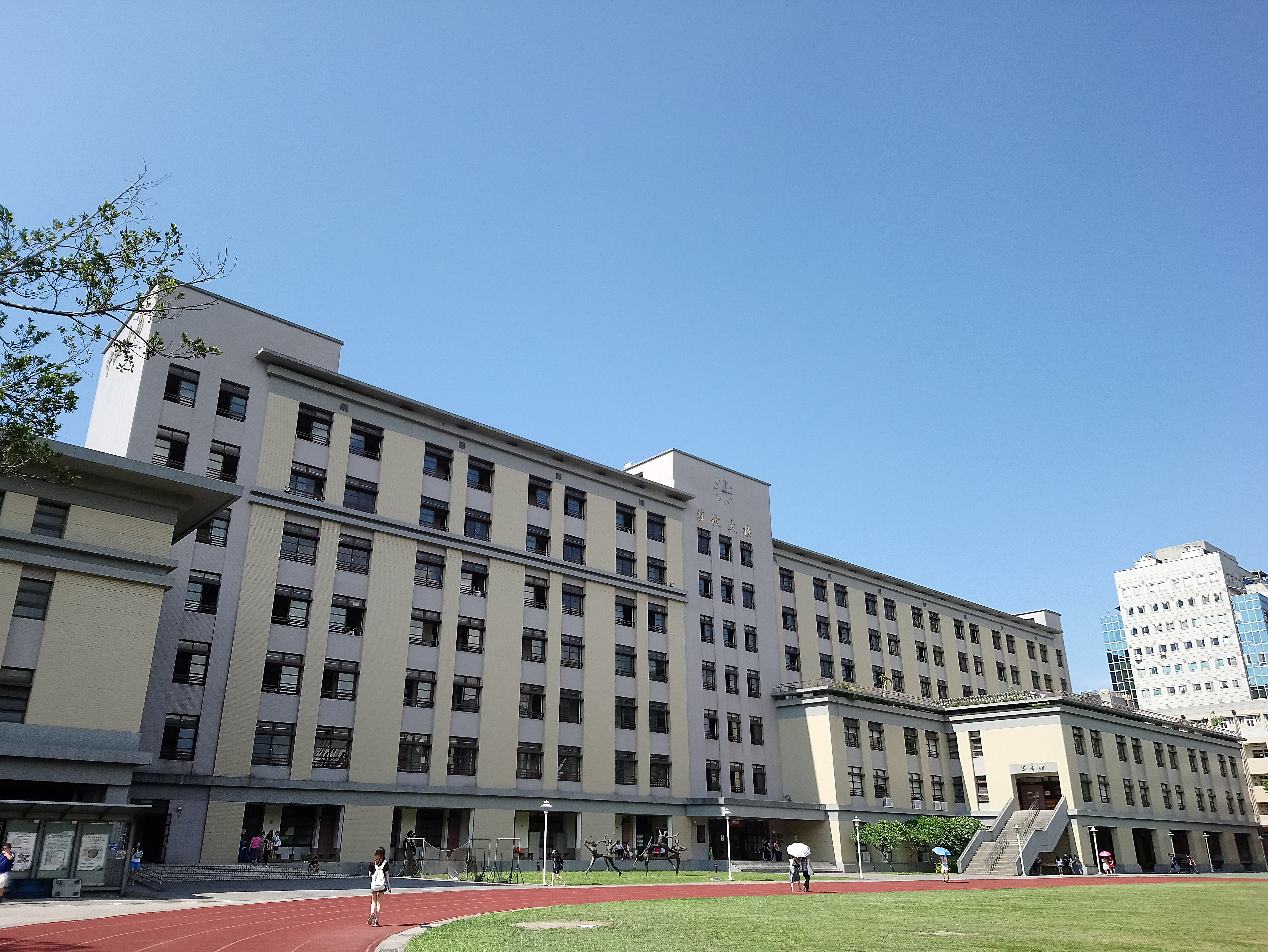 臺北市立中山女子高級中學莊敬樓,臺北市中山區朱厝崙次分區力行里